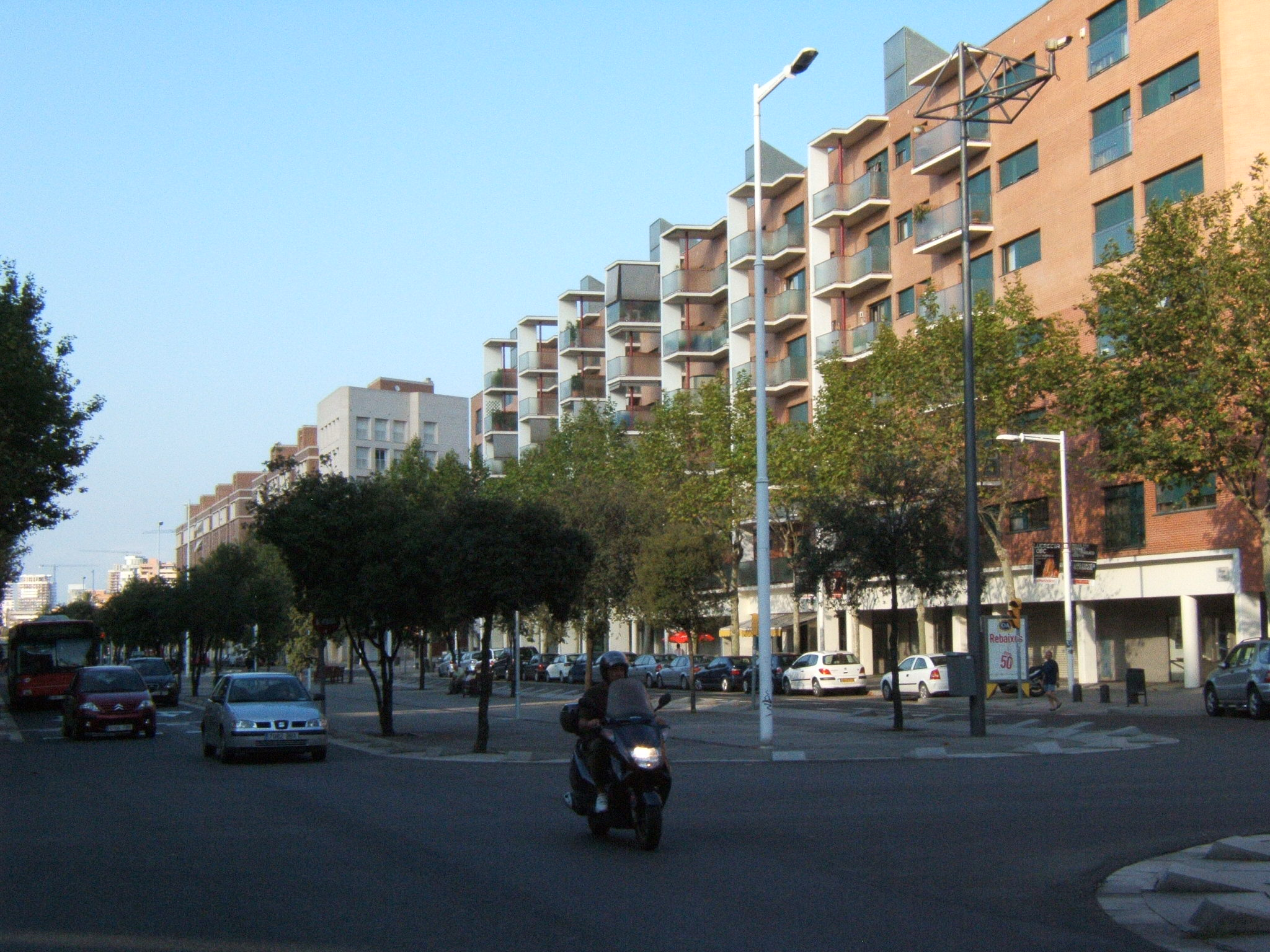 Avinguda Icària (Vila Olímpica, Barcelona)